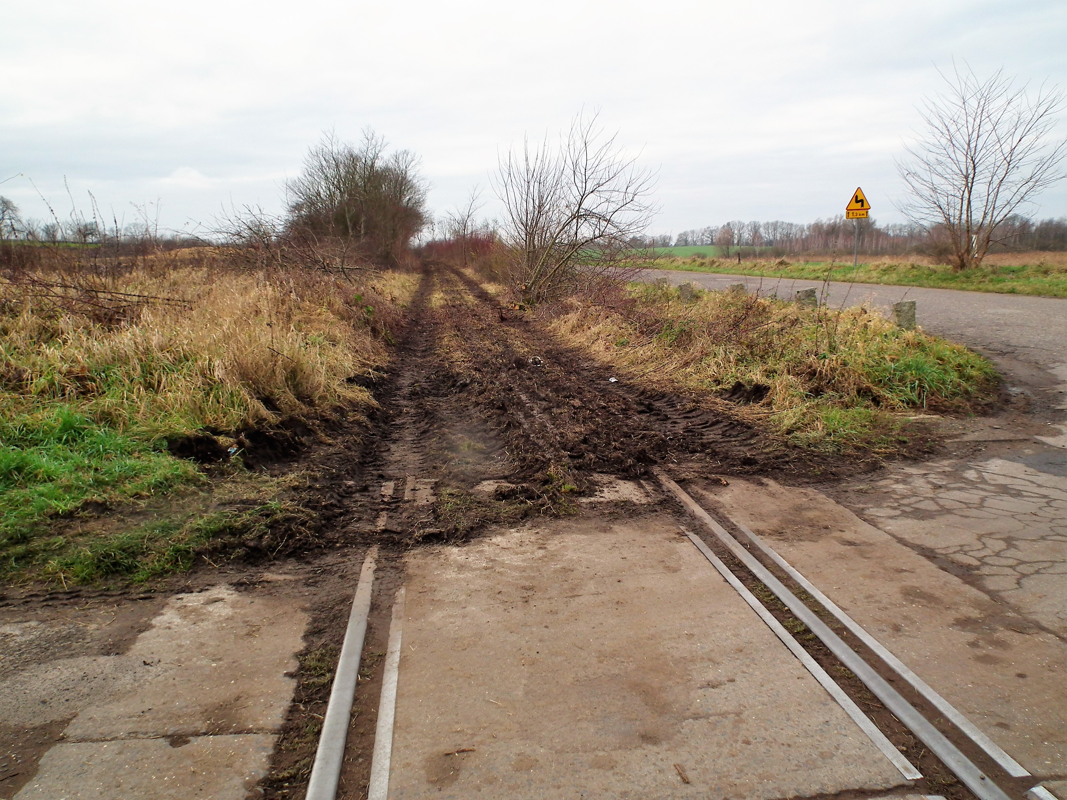 Linia kolejowa 411 w Nowym Objezierzu - prace rozbiórkowe.